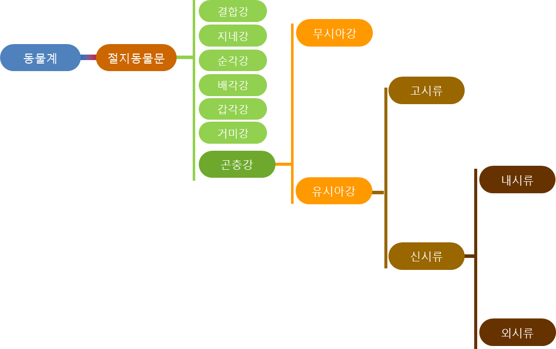 곤충의 구분